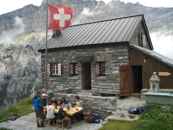 Balmhornhütte